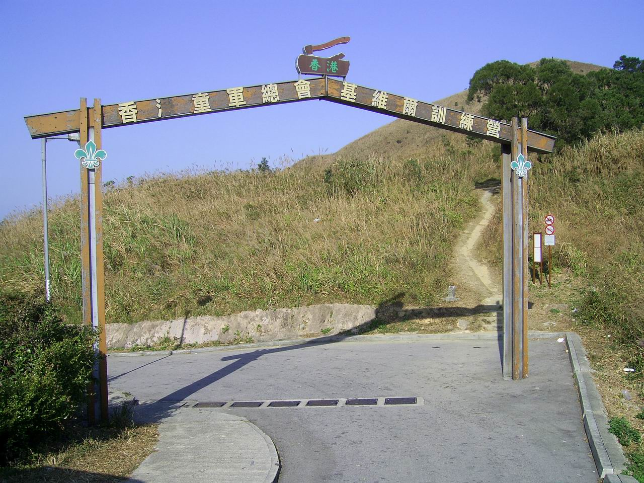 中文（香港）: 基維爾營地門樓